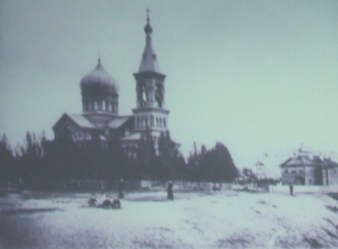 Сестрорецк СПб. Вид Петропавловской церкви